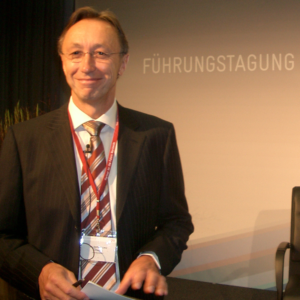 Der Autor und Organisationsberater Dr. Gerhard Lenz bei der Moderation einer Veranstaltung für Führungskräfte eines deutschen Unternehmens.